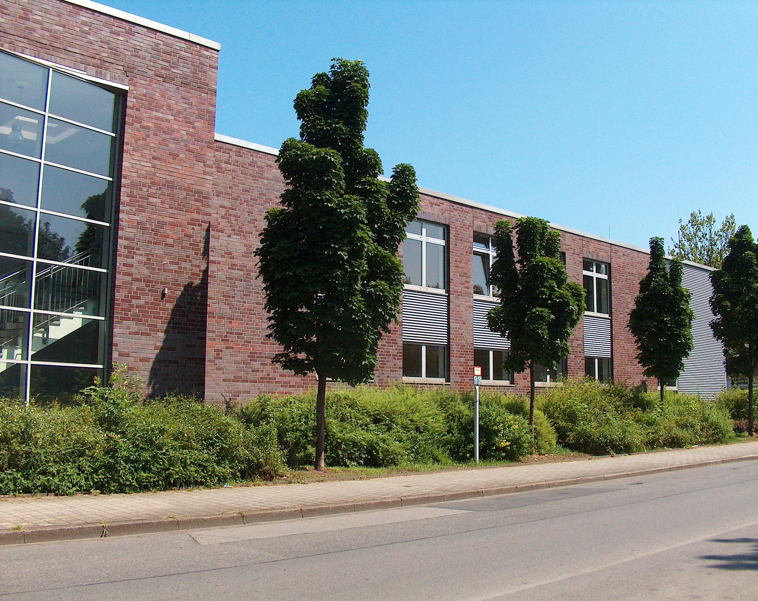 Neubau der Realschule Rheinhausen 1. Erliegt an der Stormstraße